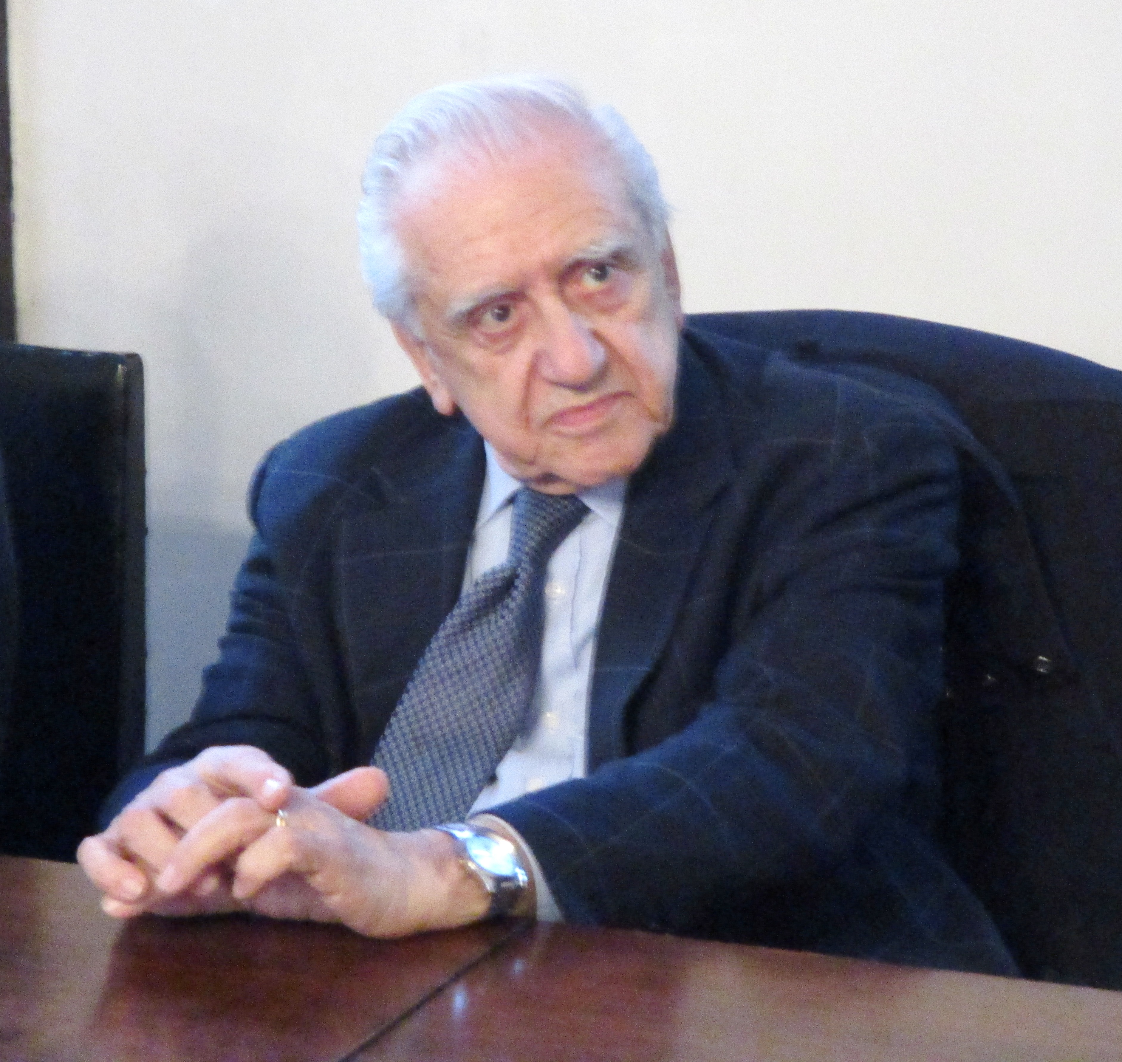 Francesco Sabatini nel 2017